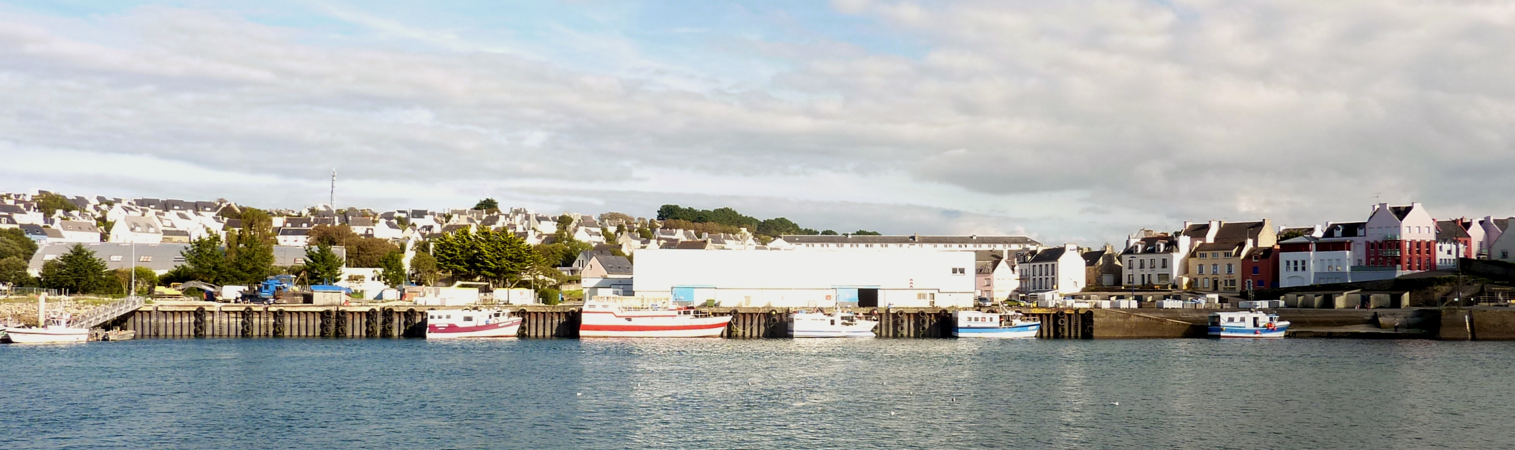 Le port de Poulgoazec et sa criée vus depuis le port d'Audierne